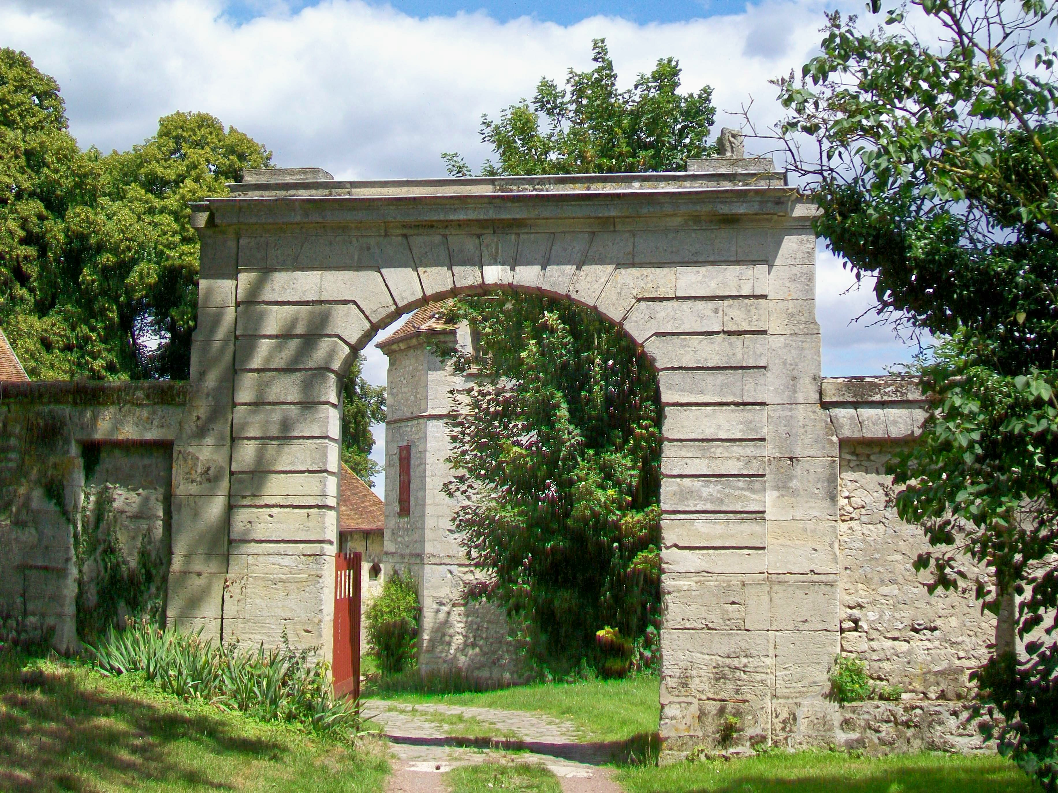 Portail de la ferme des Moutons blancs, ancienne ferme du prieuré de 1764 (au nord du château), avec vue sur le pigeonnier du Roy.